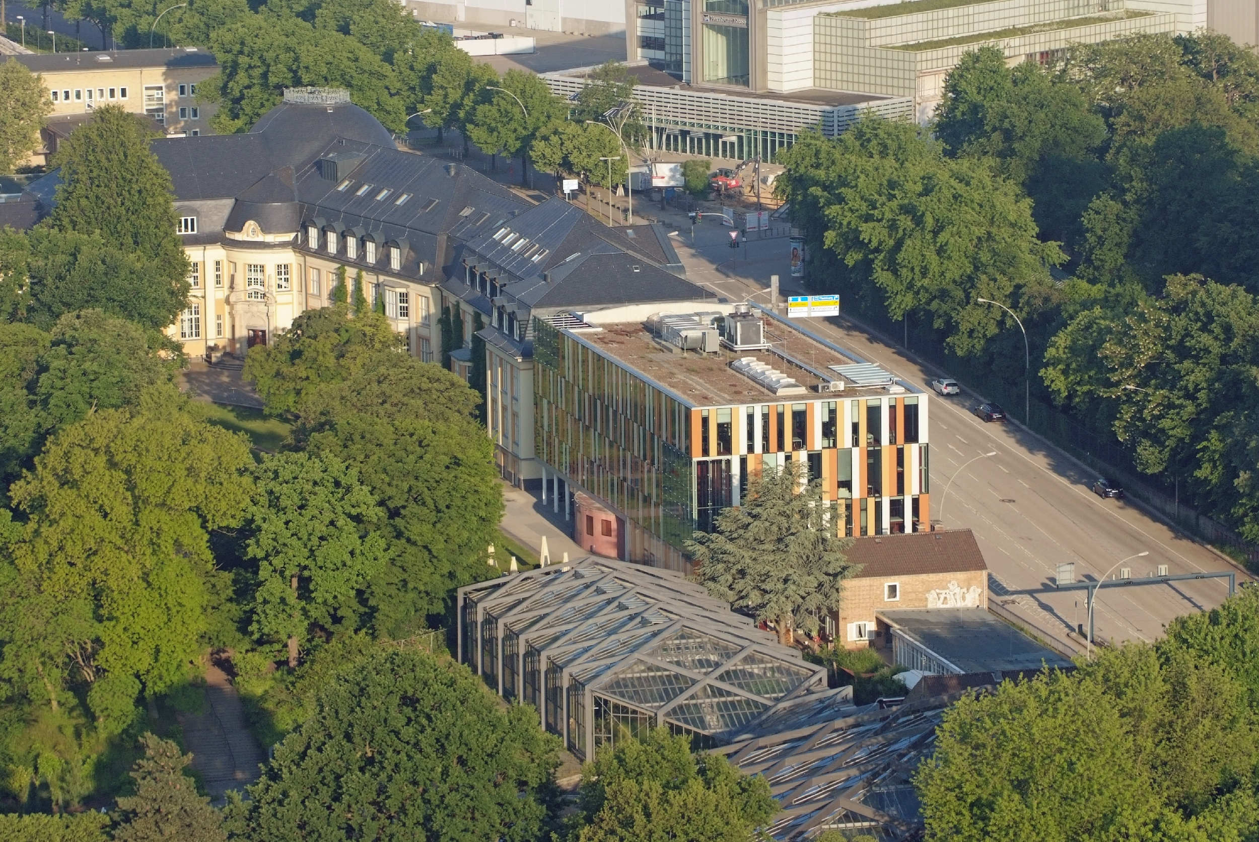 Projekt Heißluftballon